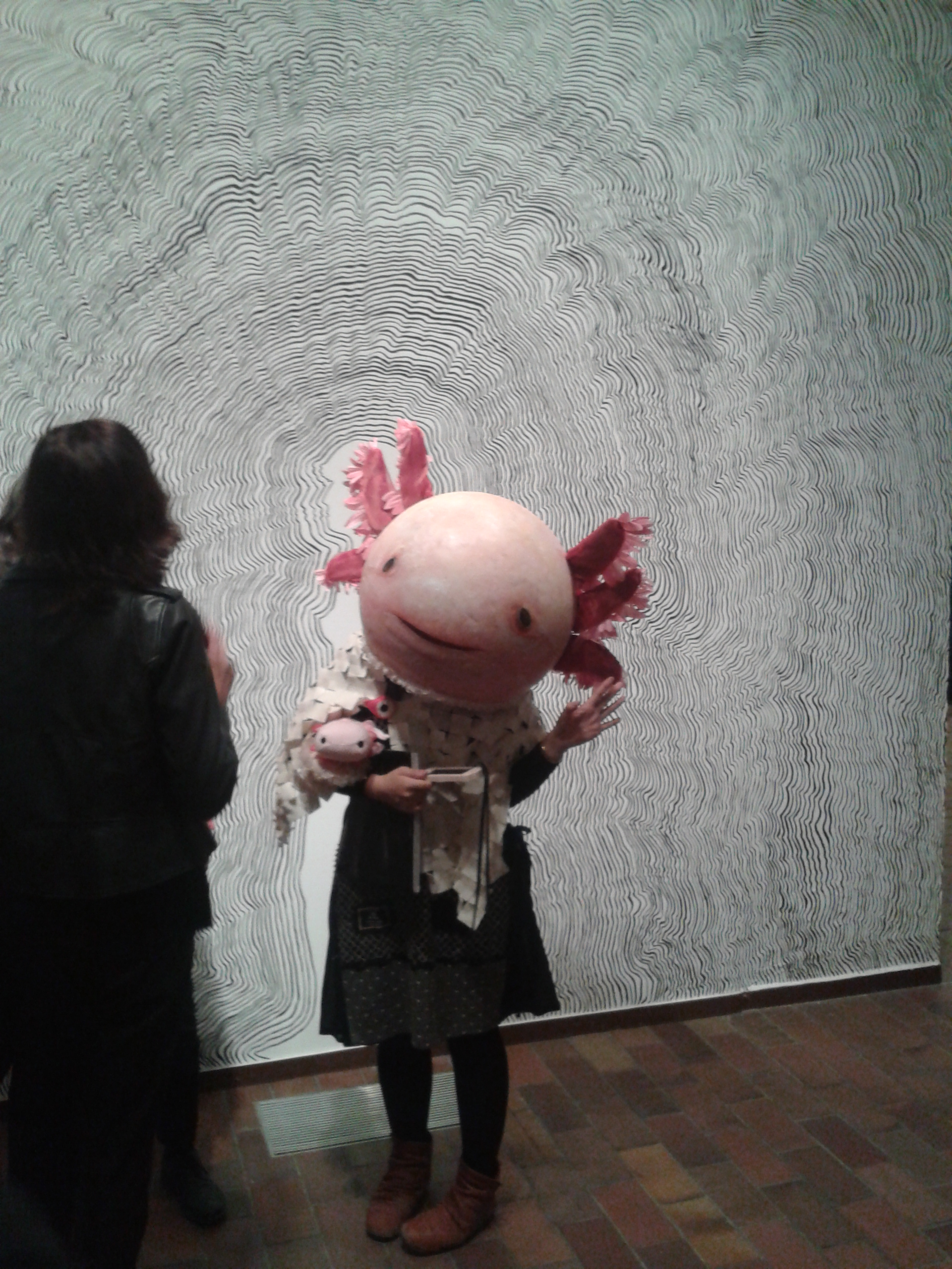 Erina Matsui durant la inauguració de l'exposició "Haver fet un lloc on els artistes tinguin dret a equivocar-se", commemorativa del 35è aniversari de l'Espai 13 de la Fundació Joan Miró